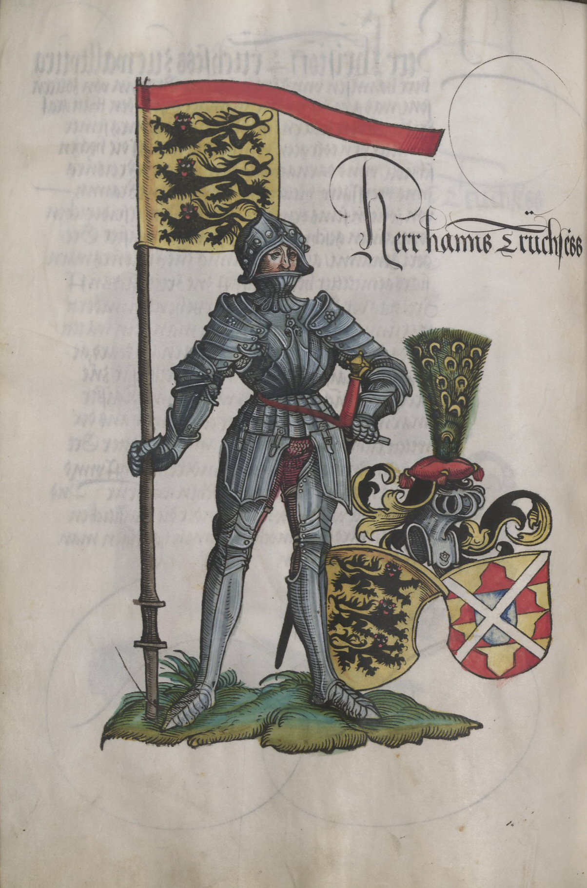 Holzschnitt aus der Chronik der Truchsessen von Waldburg (Truchsessenchronik) in der Pergamenthandschrift der Württembergischen Landesbibliothek Stuttgart (ehemals Fürstl. Bibliothek Donaueschingen), Cod. Don. 590 Herr hanns Truchsess